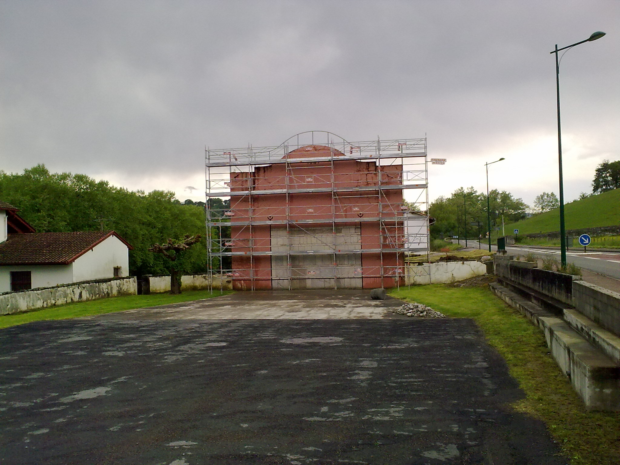 Uhart-Mixe, France